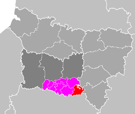 Maps of arrondissements and cantons of France: Département de l'Oise